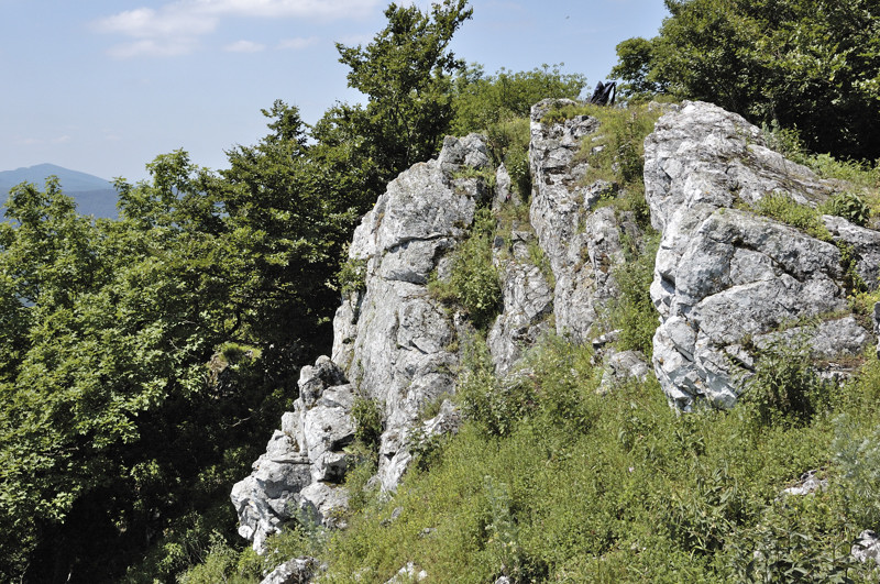 Vrchol Čela